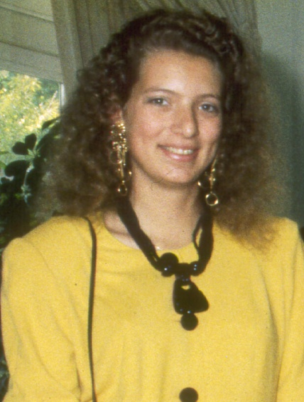 Die Motorbootrennfahrerin Claudia Knape bei der Verleihung des Silbernen Lorbeerblattes 1991.